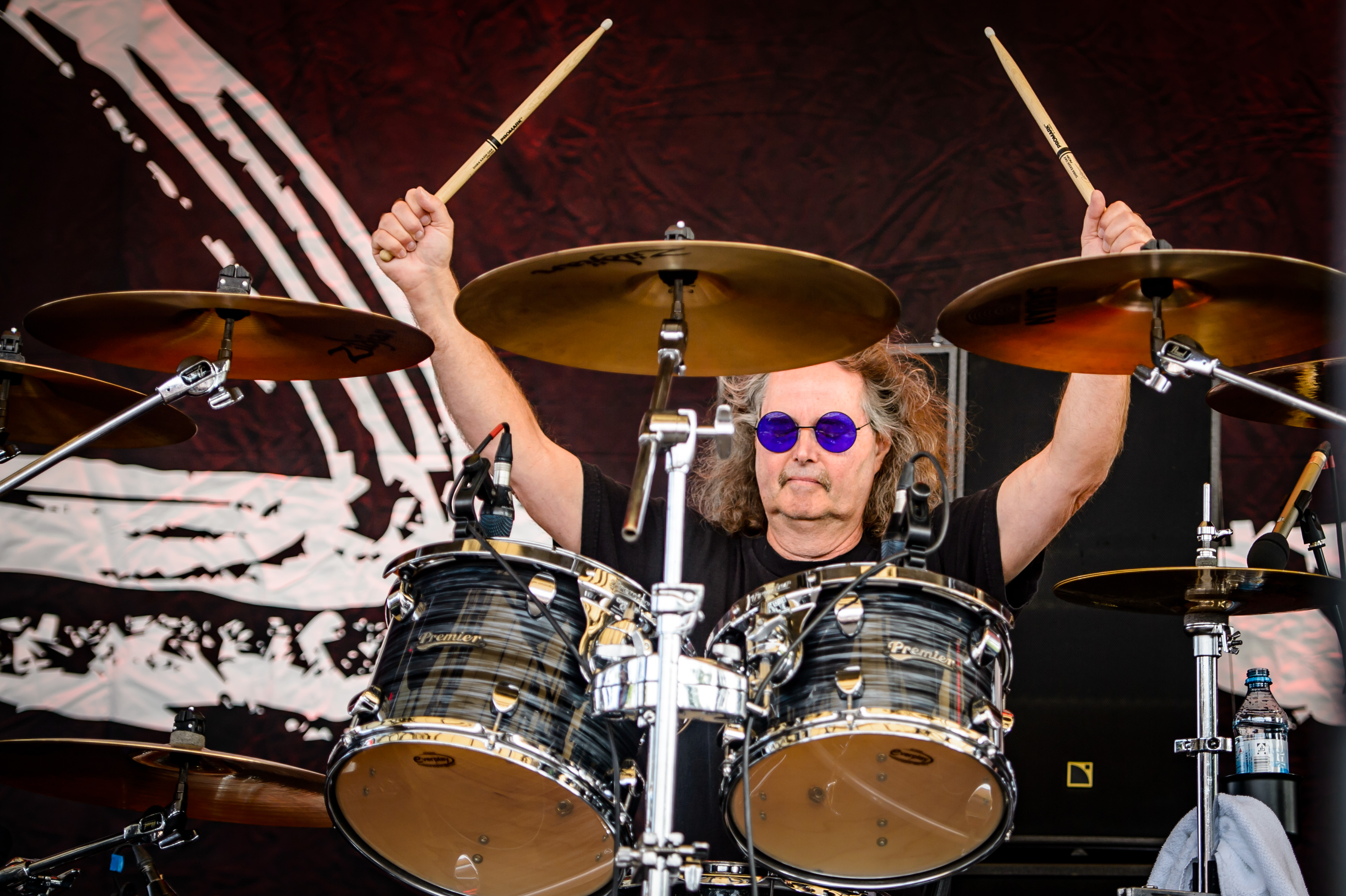 'Rock Hard Festival 2018; Amphitheater Gelsenkirchen': 'Cirith Ungol'